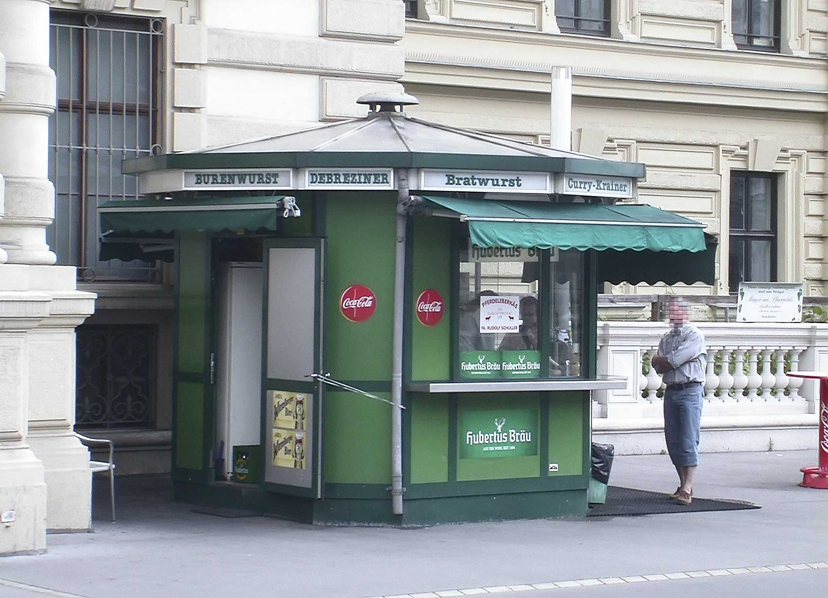 Wiener Würstelstand am Schwarzenbergplatz, Sommer, Tag